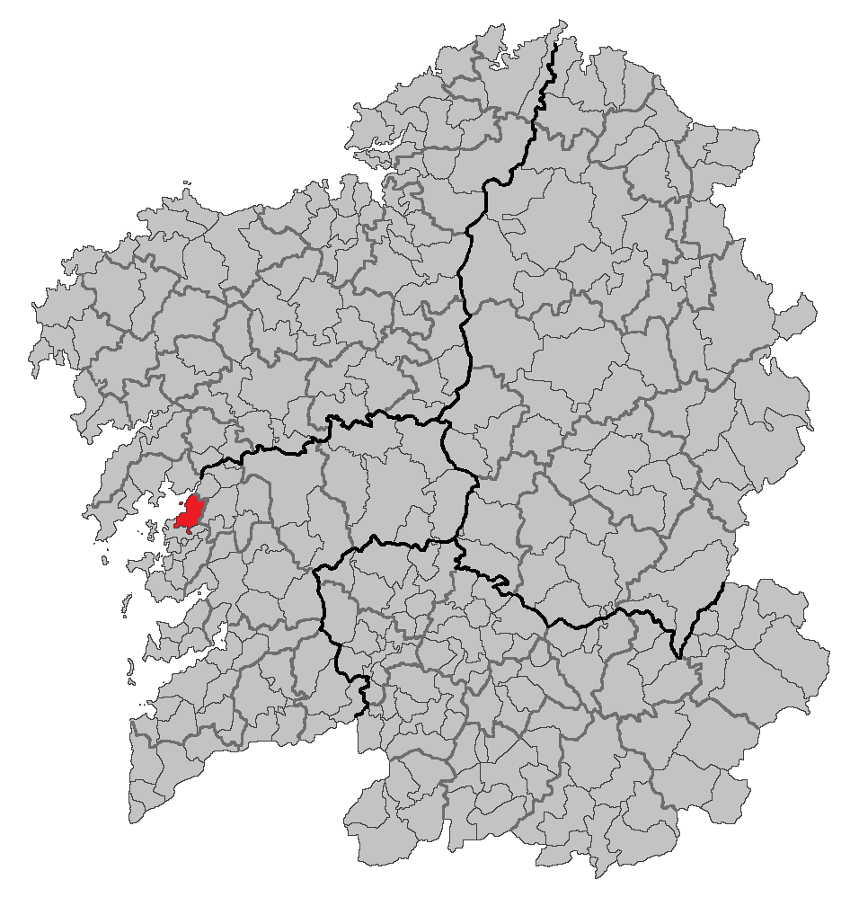 Mapa coa localización do concello de Vilagarcía de Arousa.